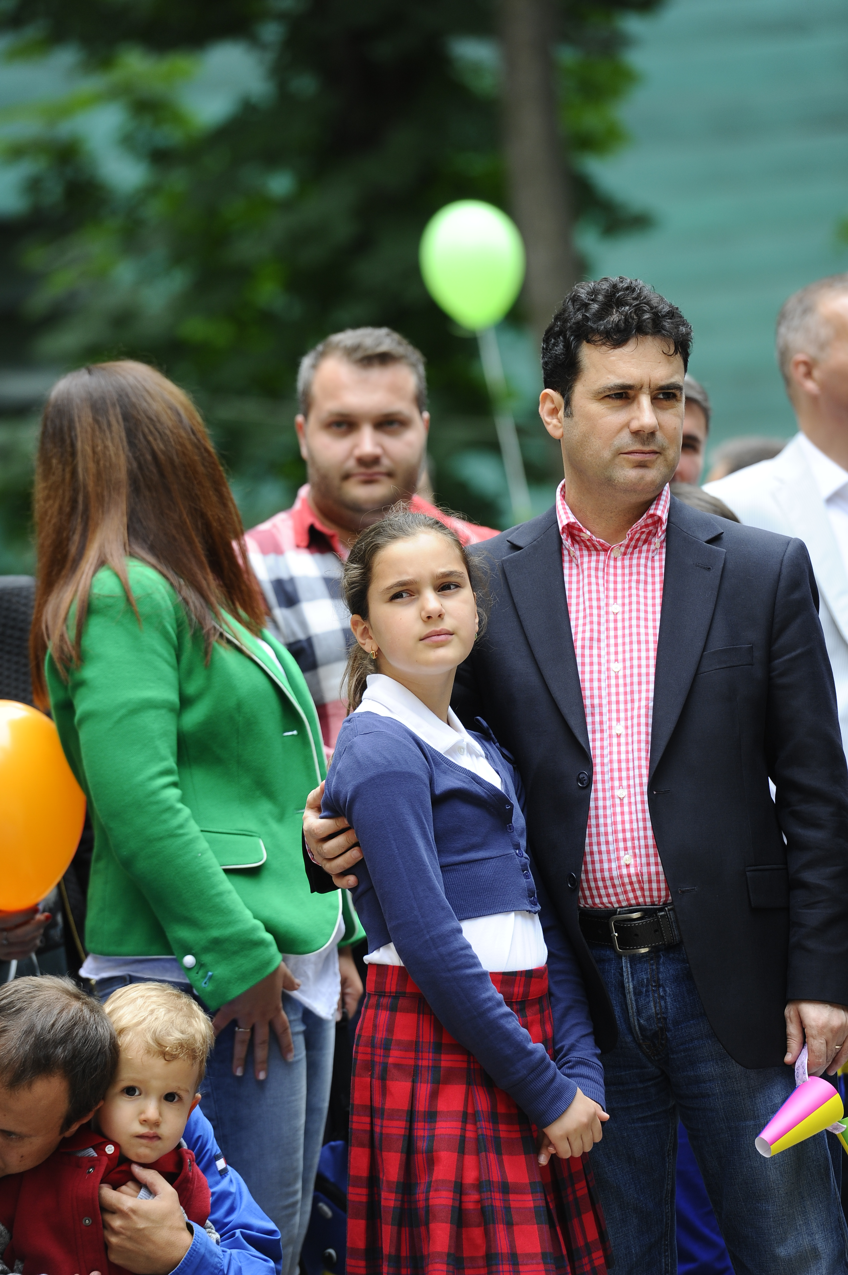 Ziua Internationala a Copiilor, serbata la sediul PSD - 01.06 (14)